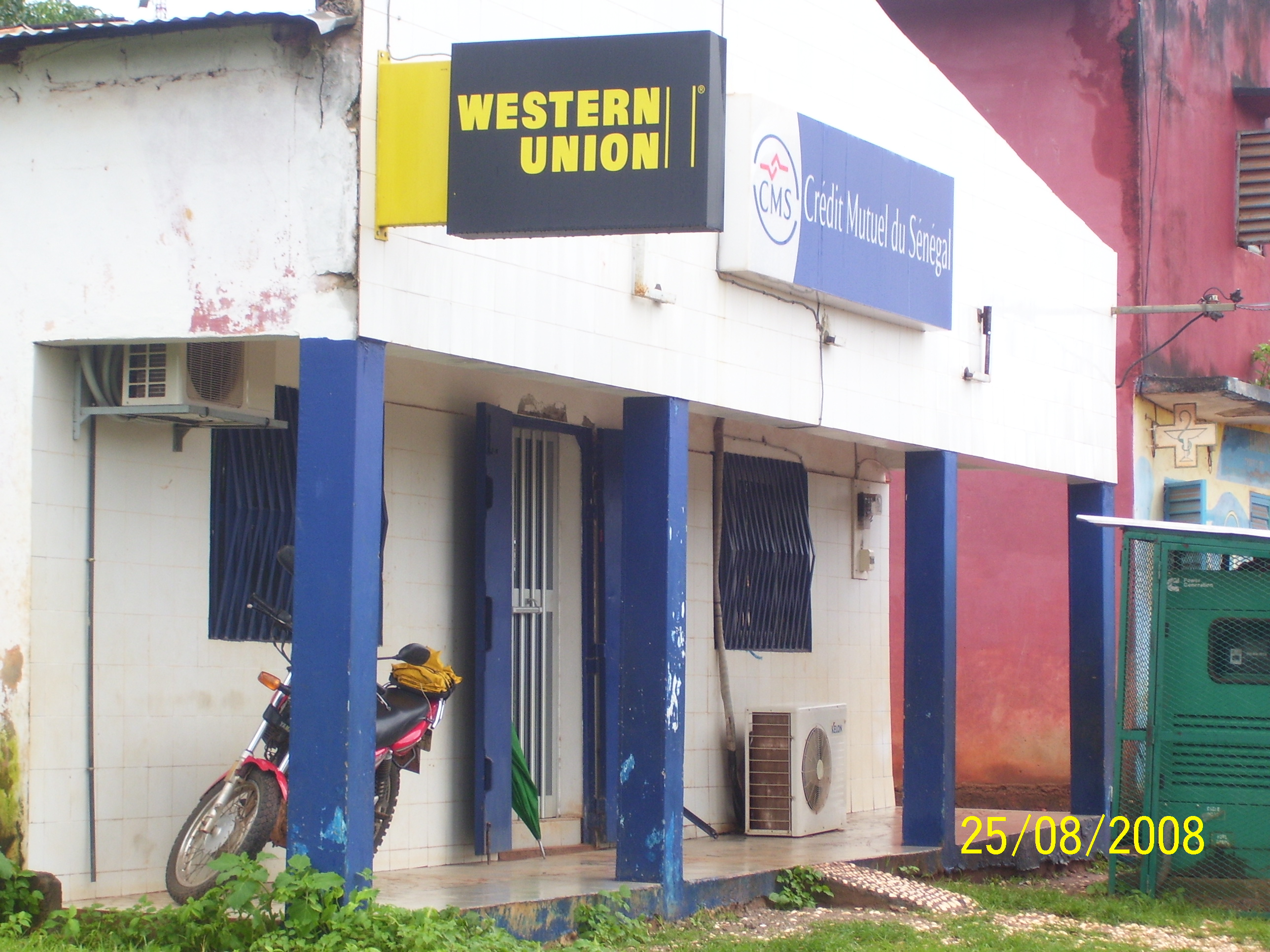 La Banque du Crédit Mutuel Sénégalais est présente à Goudomp et a beaucoup de sociétaires dans les différents corps de métier de la ville